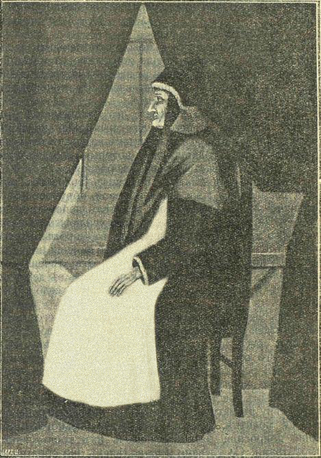 Евфросиния Колюпановская